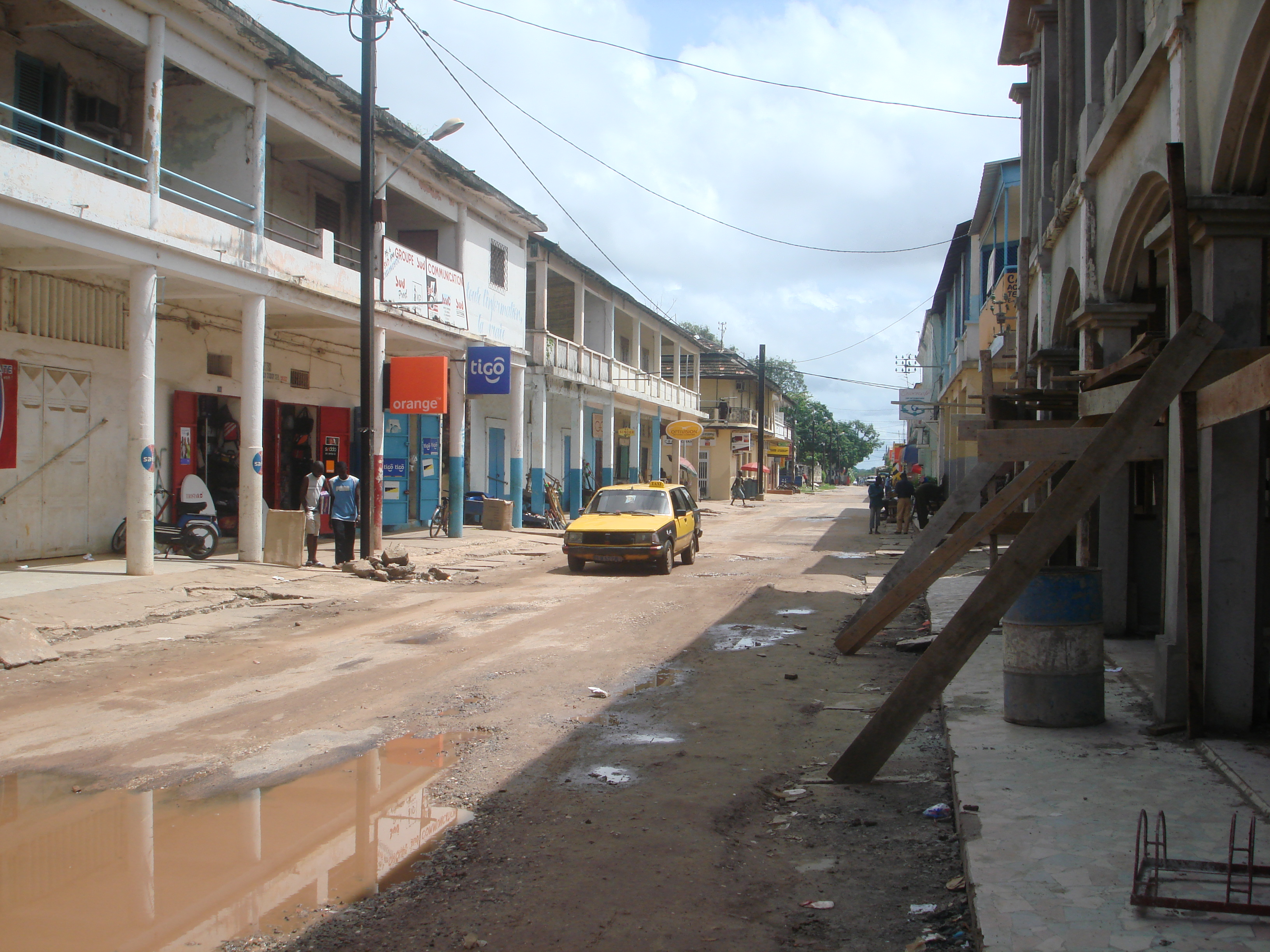 Une rue de Ziguinchor (Casamance, Sénégal)